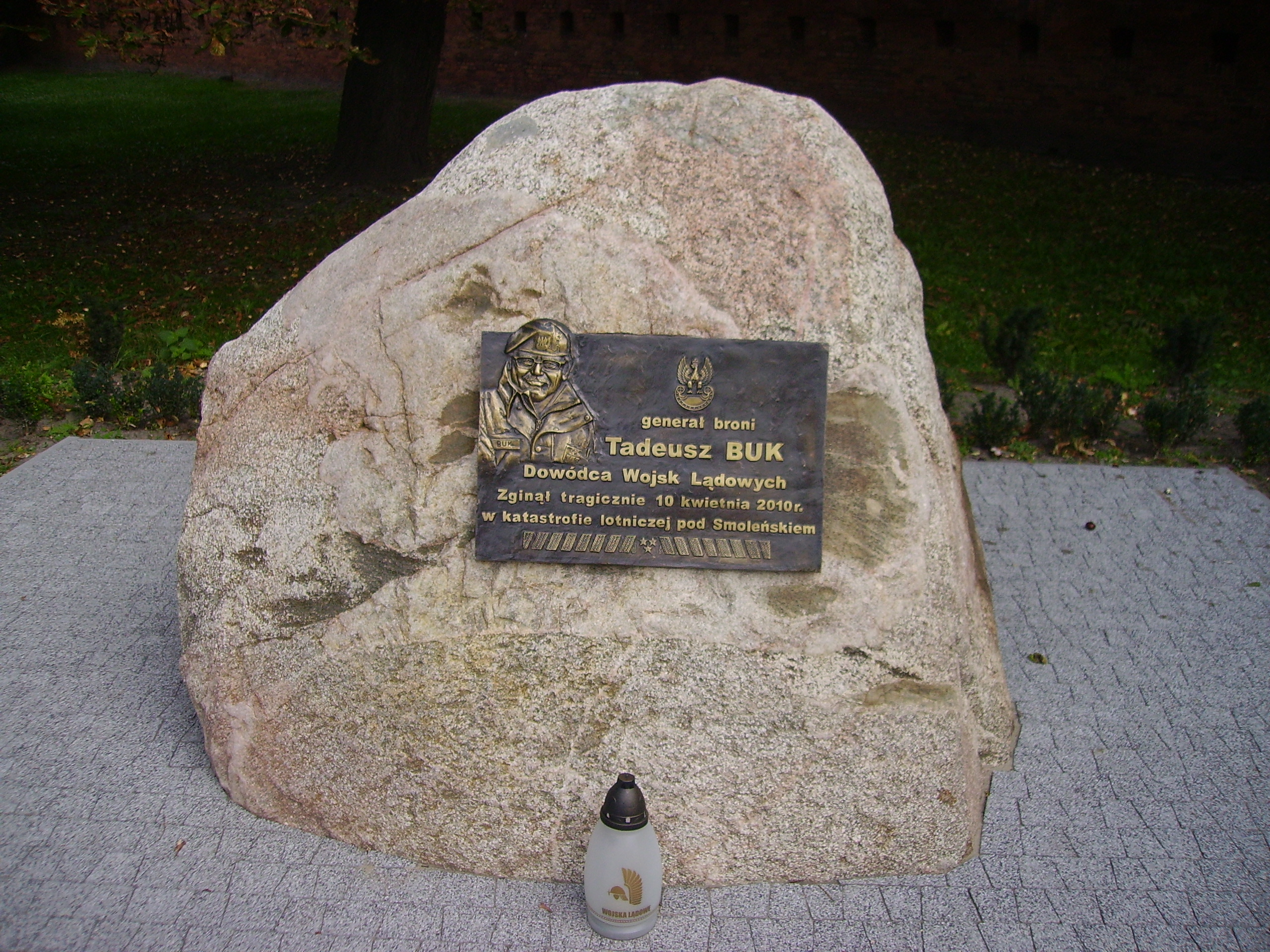 Pomnik upamiętniający dowódcę Wojsk Lądowych, gen. T. Buka